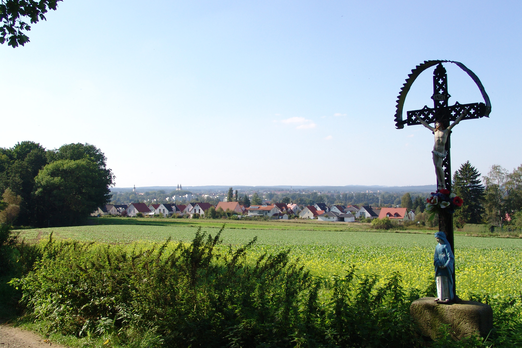 Wegkreuz im Osten der Stadt Weiden i. d. OPf. Summary Bildarchiv der Stadt Weiden in der Oberpalz. Alle Veröffentlichungsrechte im Besitz der Stadt.